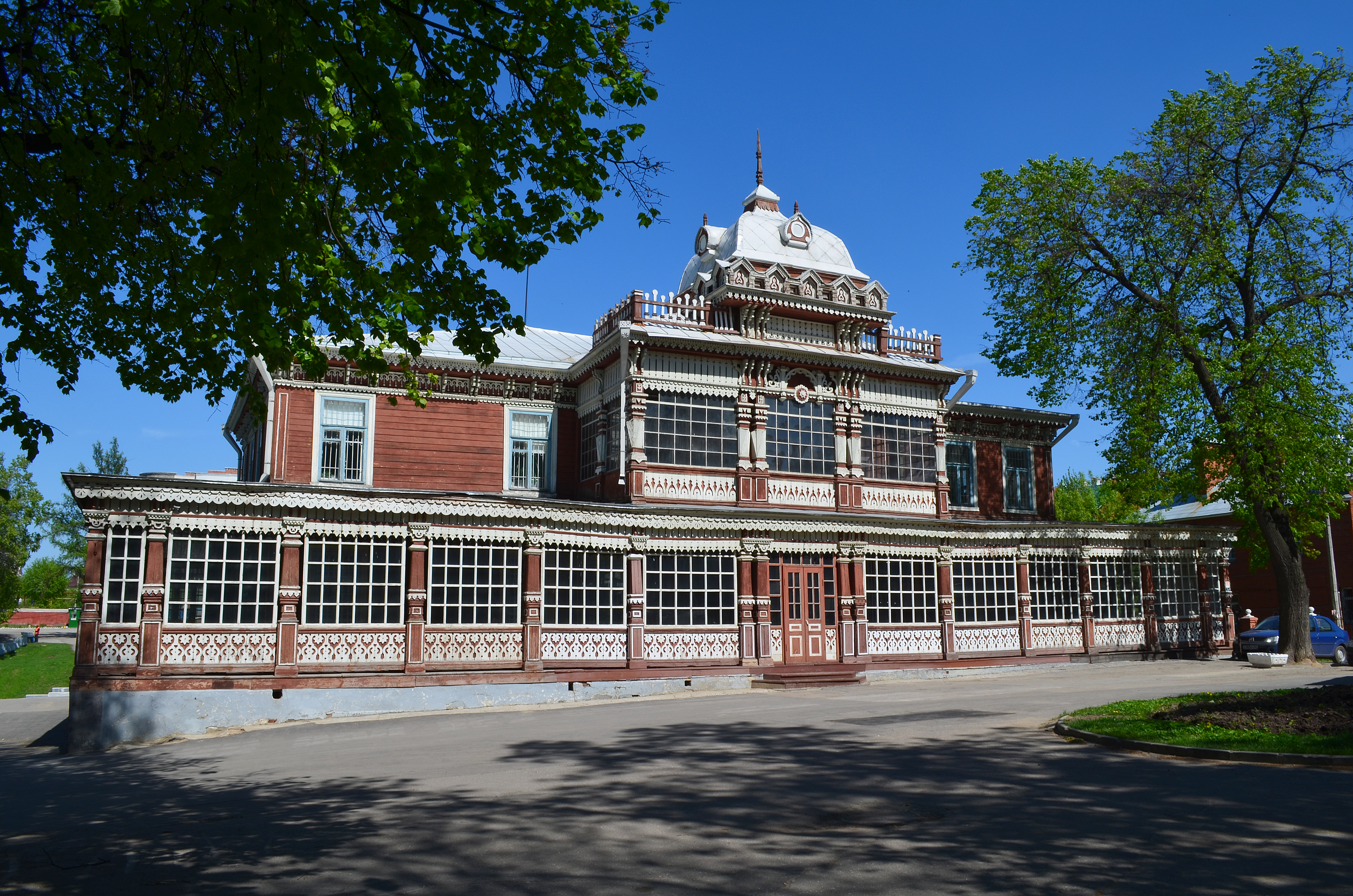 Летний дом Дворянского собрания в Рязани.